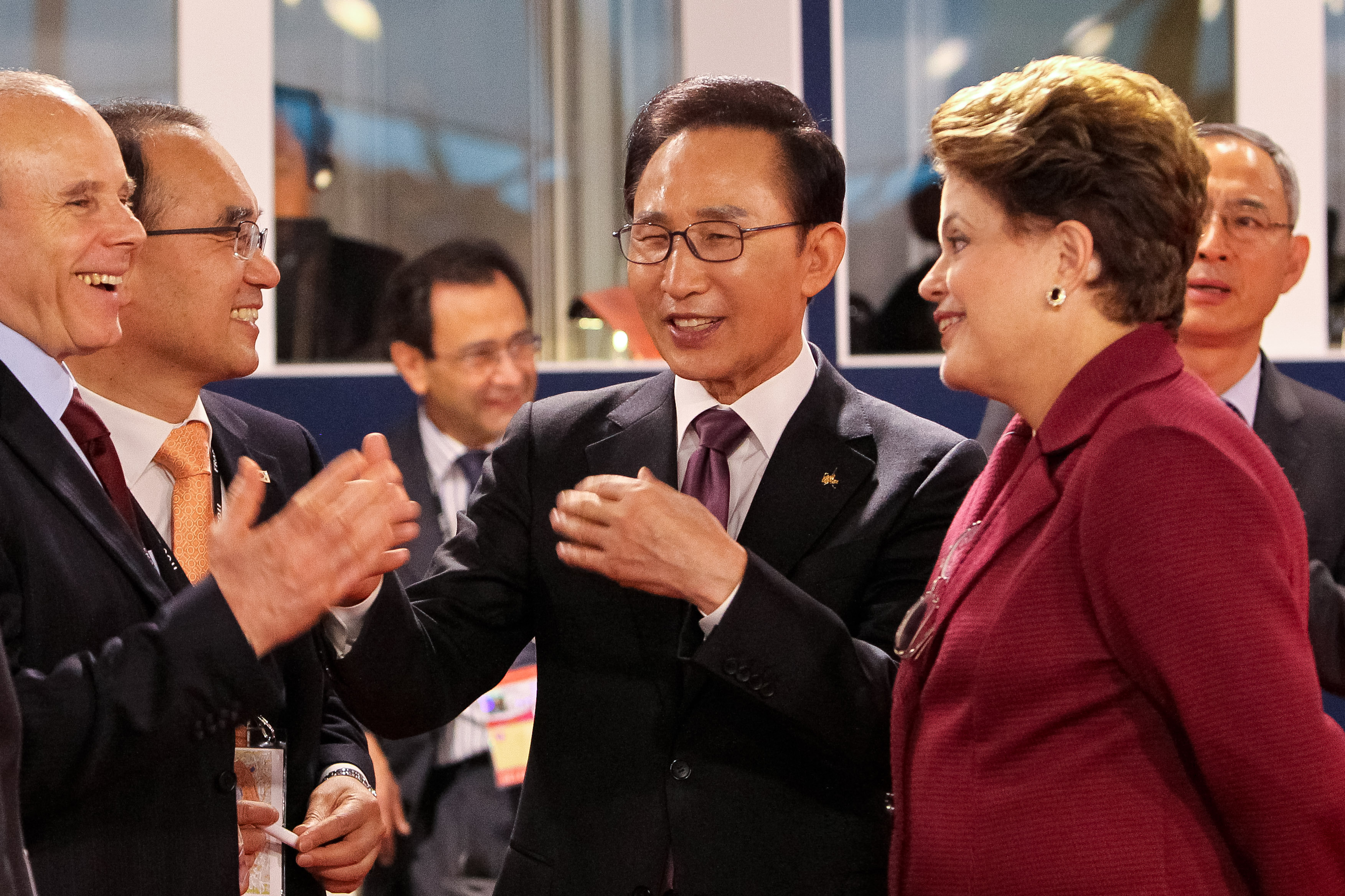 Cannes, França. Presidenta Dilma Rousseff conversa com o Presidente da Coréia Lee Myung-bak durante sessão de trabalho na Cúpula de Líderes do G20.